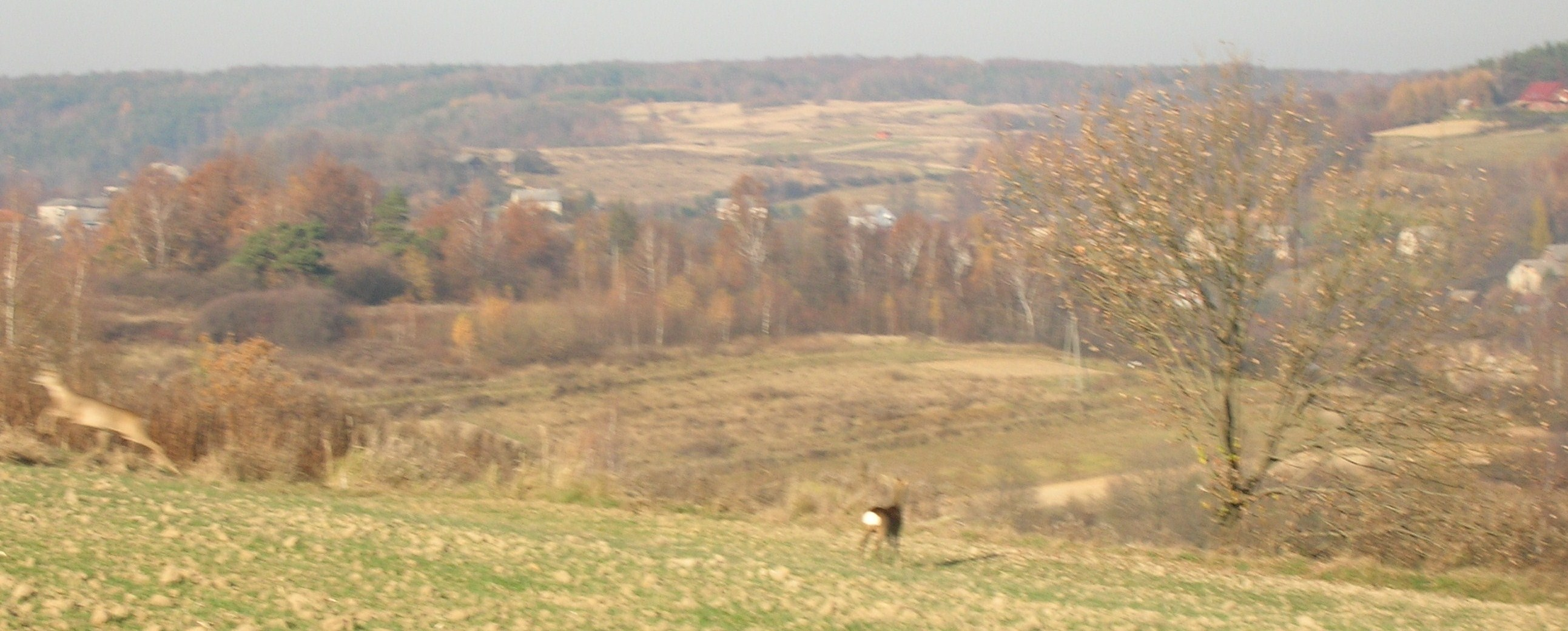 Dolina Czernki.Część północna